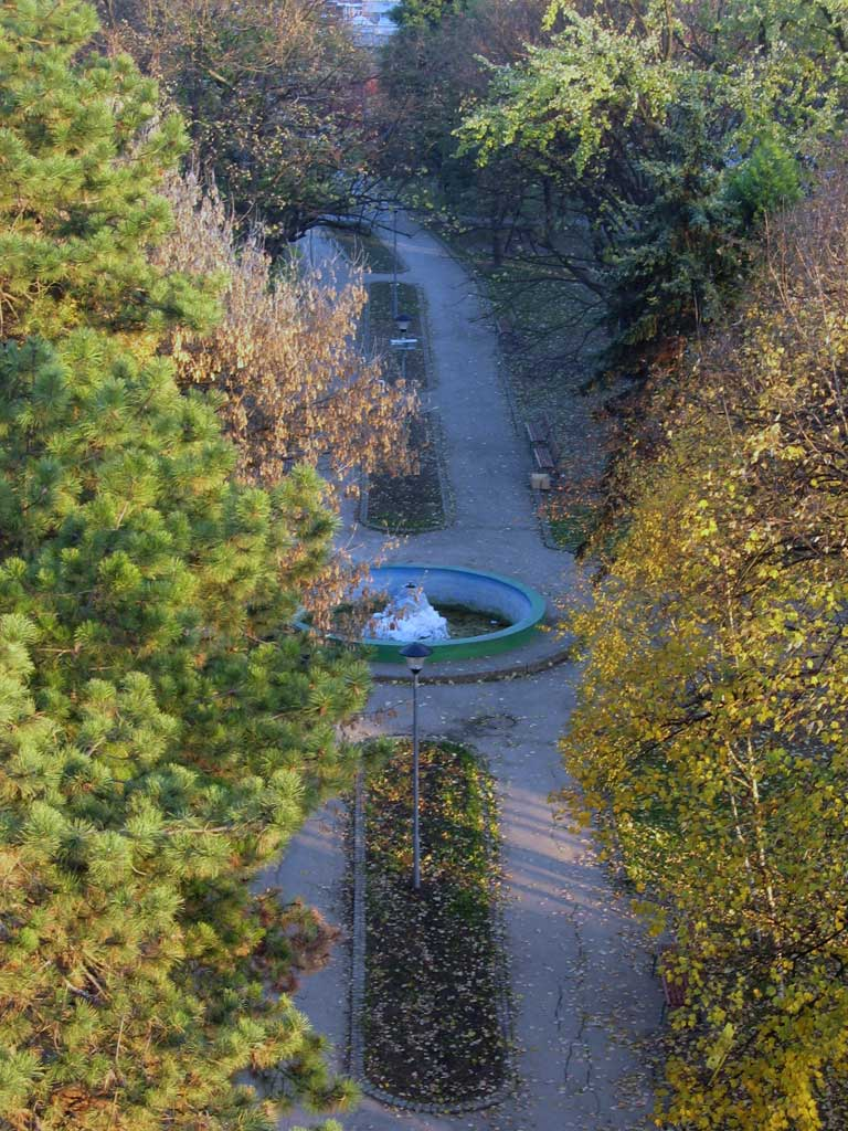 Парк у центру Смедеревске Паланке